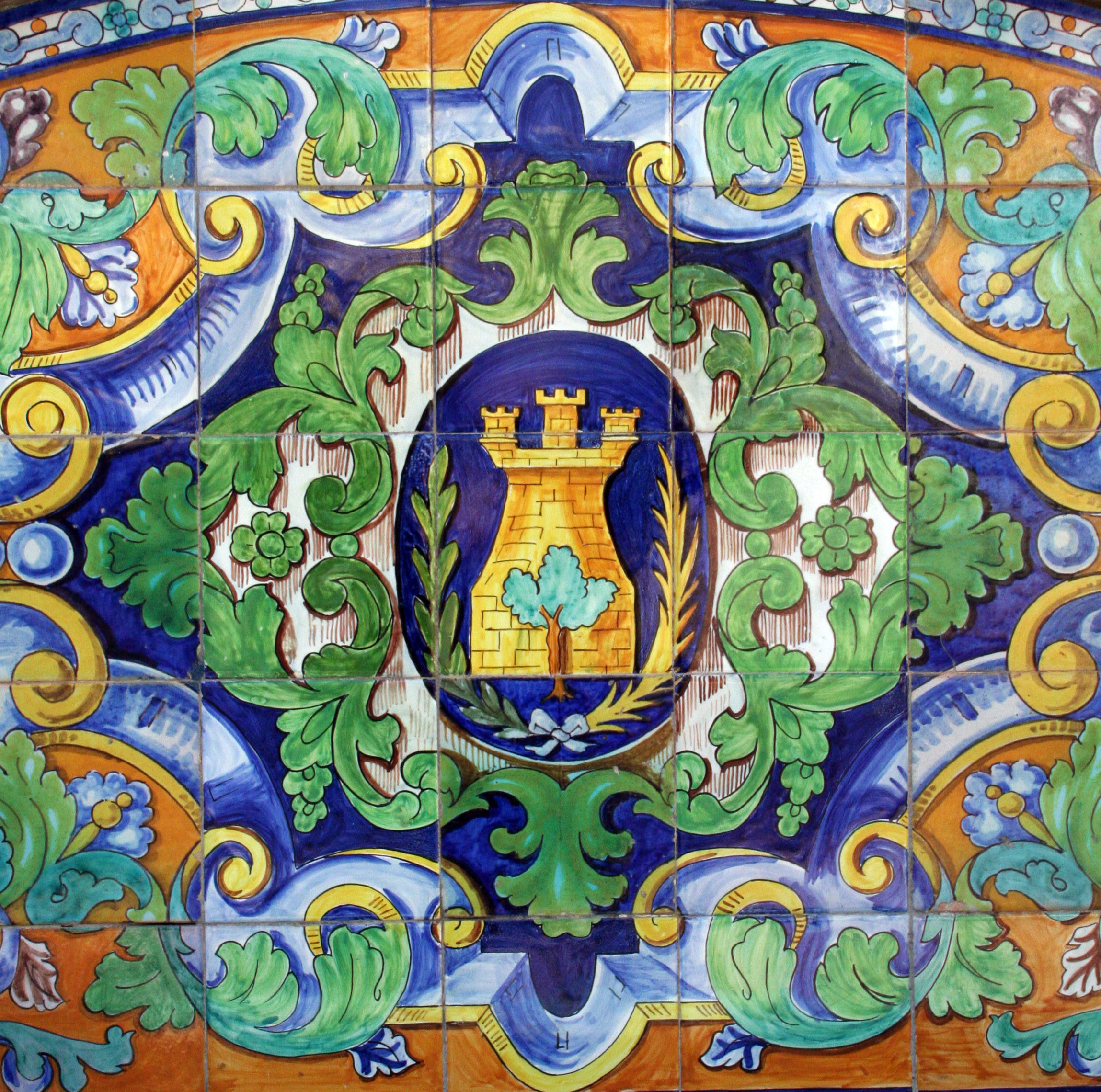 Escudo de Ayamonte pintado en los azulejos de uno de los bancos de la Plaza de la Laguna de Ayamont, Huelva, Spain.